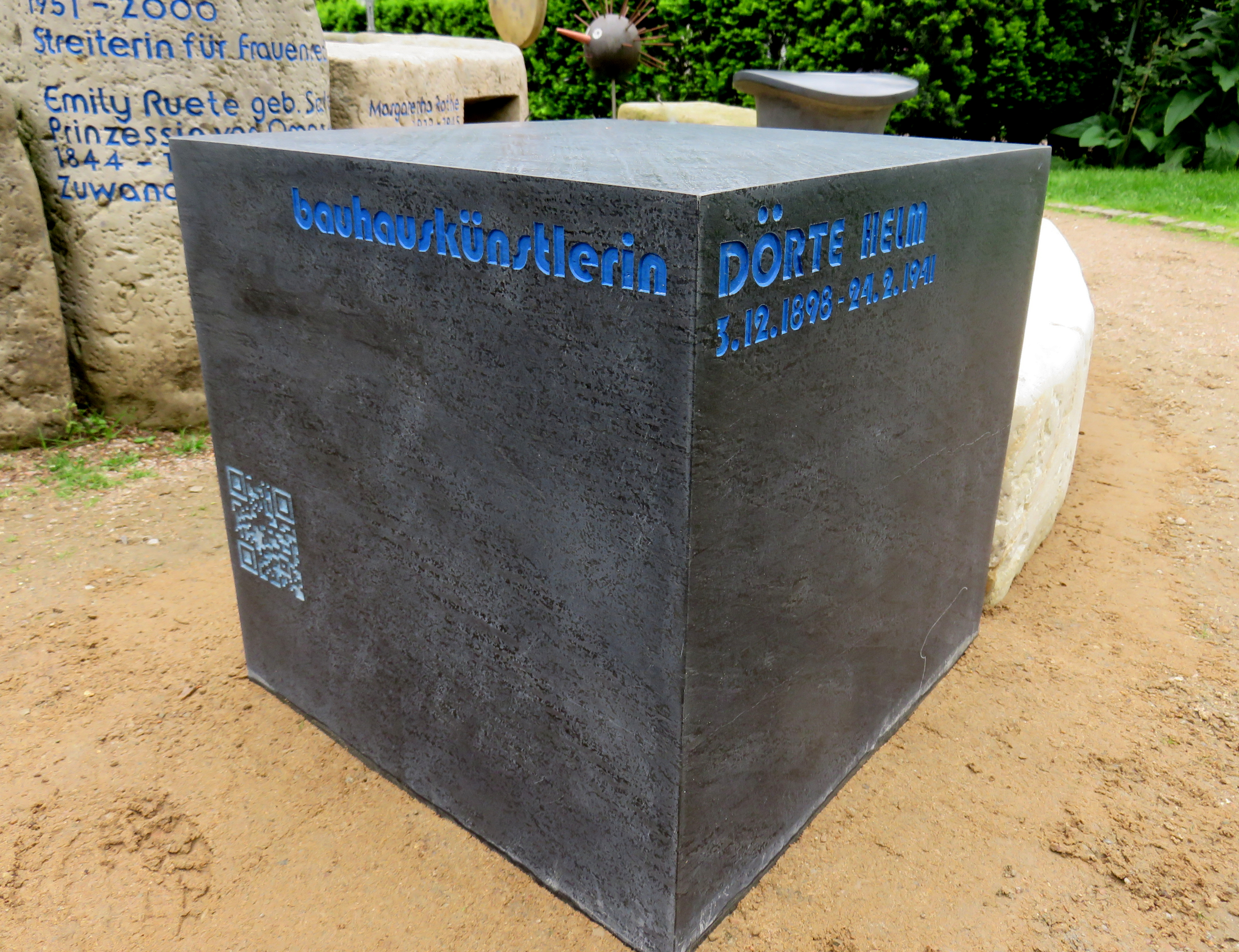 Gedenkstein in Form eines "Sitzwürfels" für die die deutsche Bauhauskünstlerin und Malerin Dörte Helm. Der Stein ist Teil der Erinnerungsspirale im Bereich des Gartens der Frauen auf dem Ohlsdorfer Friedhof in Hamburg-Ohlsdorf.